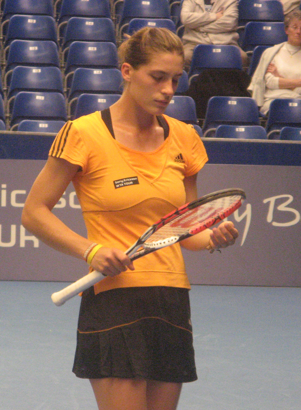 Andrea Petkovic beim WTA-Turnier in Luxemburg